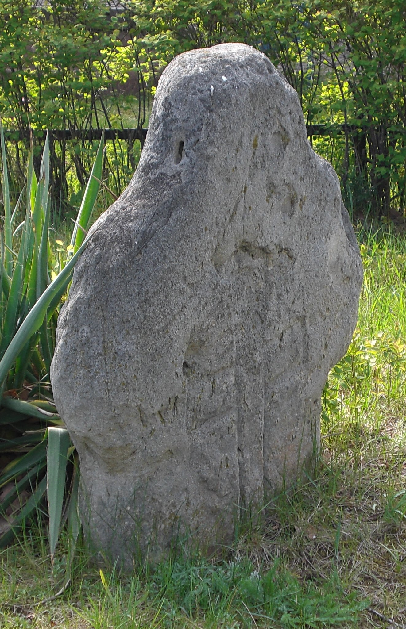 Sechs Steine Ilberstedt, dritter Stein